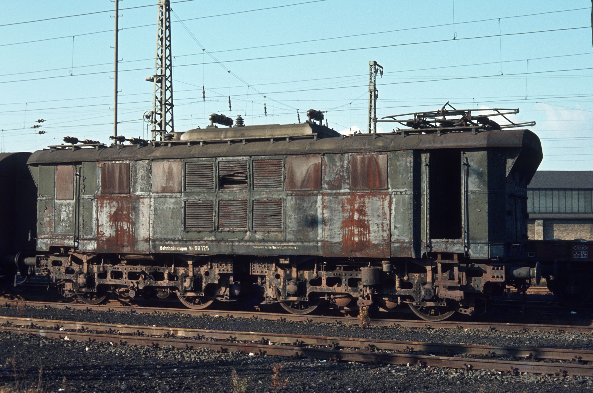 Die Vorserienlok der BR E 44.5, die E 44 501 wurde bereits im Jahre 1959 ausgemustert. Dennoch hat sie bis 1979 als Übungsobjekt eines Lehr-Hilfszuges fernab ihrer einstigen Stammstrecke überlebt. Die Aufnahme zeigt die durch die unzähligen Aufgleis-Übungen völlig ramponierte Lok im November 1979 im Bahnbetriebswerk Hamm als Bahnhofswagen 60125. Anfang der 1980er Jahre wurde sie verschrottet. Während der Lokkasten bereits der ersten Bauserie (E 44 502 -505) gleicht, haben die Drehgestelle einen kürzeren Achsstand.